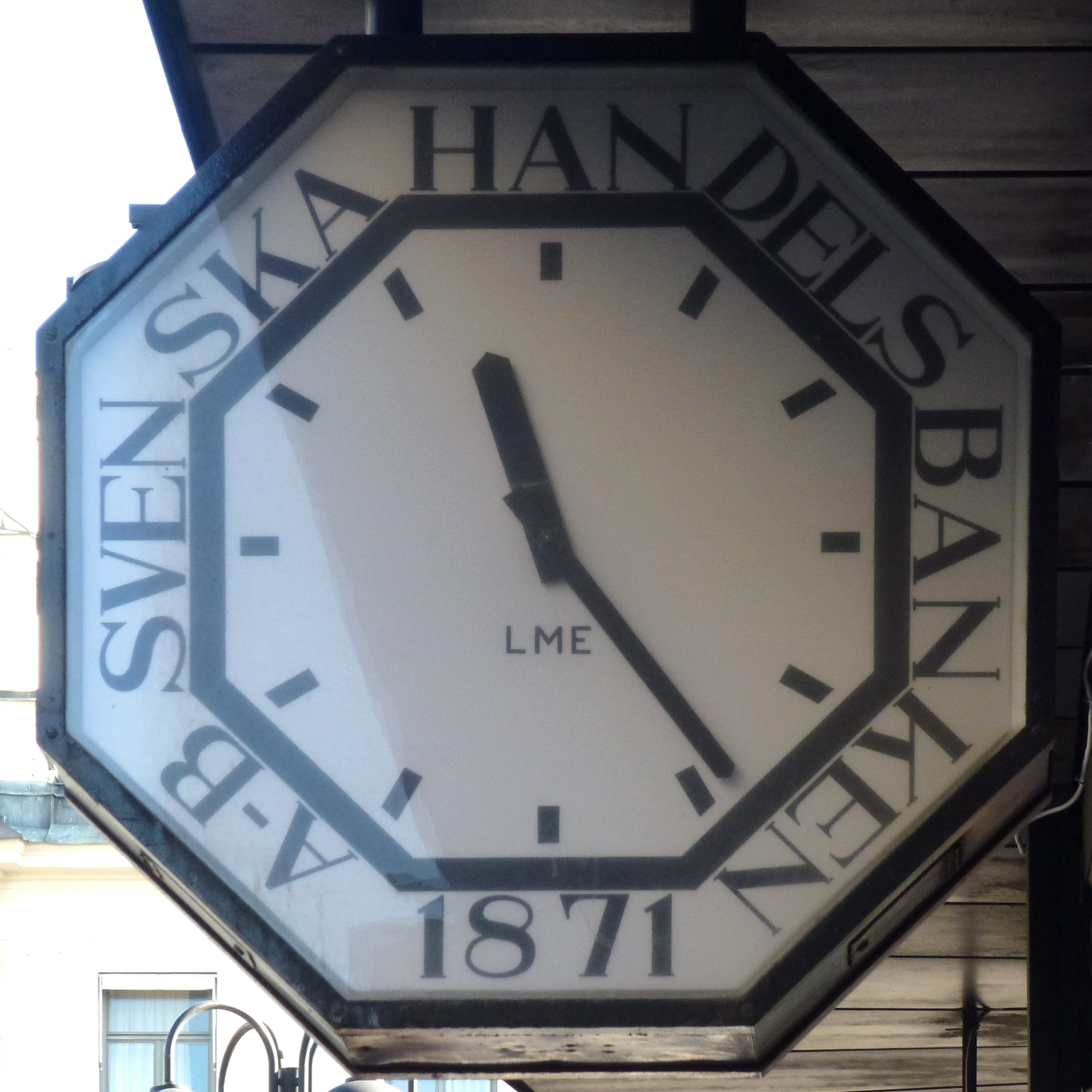 Fasadur för Svenska Handelsbankens filial, Kungsgatan 1 i Stockholm